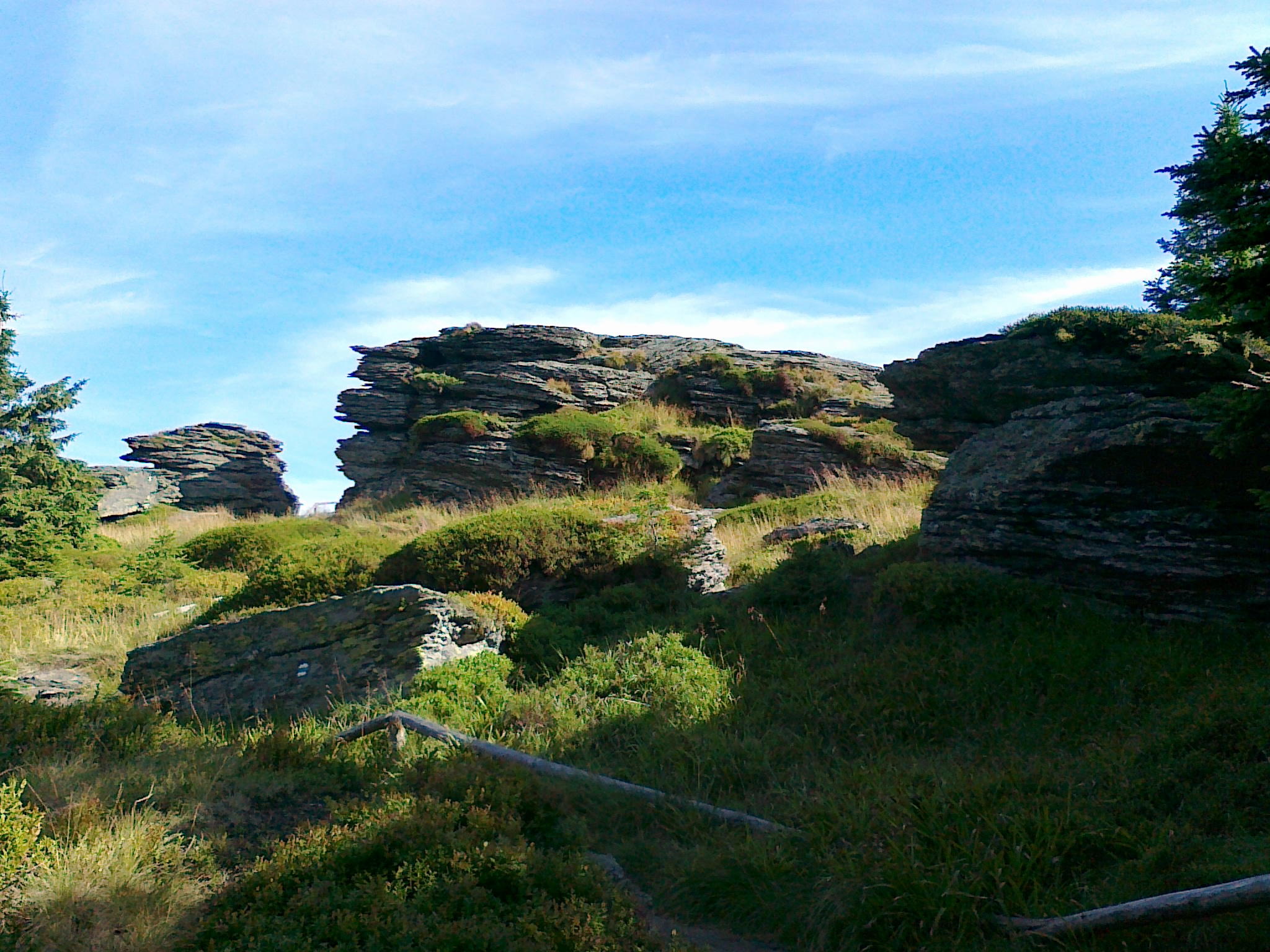 Skaliska na szczycie góry Vozka - 1377 m n.p.m.